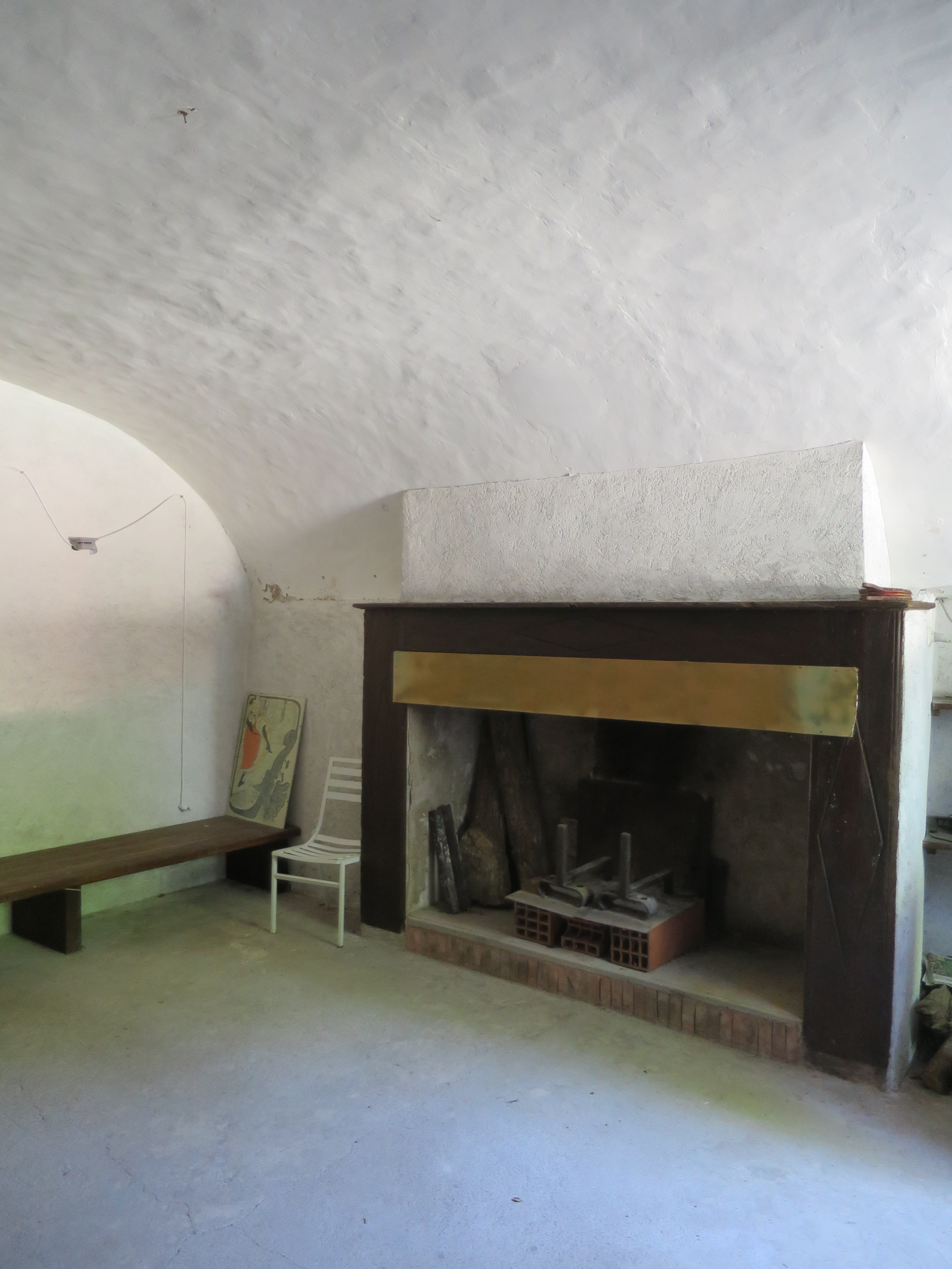 Villa Lebrun, Marssac-sur-Tarn, Küche